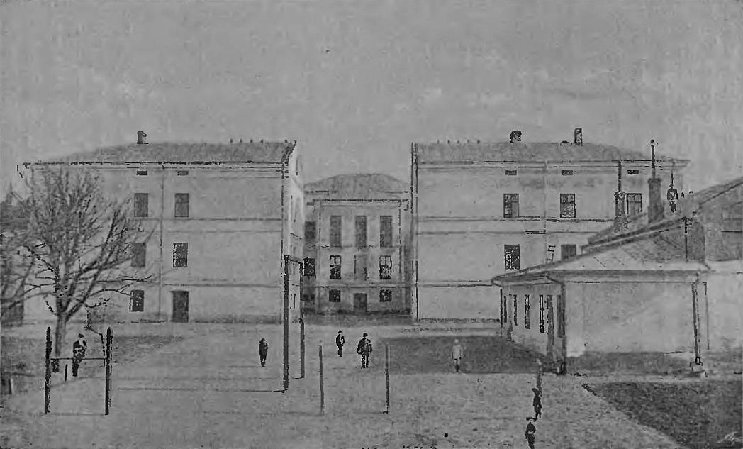 Wybudowany w latach 1891-1892 gmach C. K. Gimnazjum Arcyksiężniczki Elżbiety w Samborze.